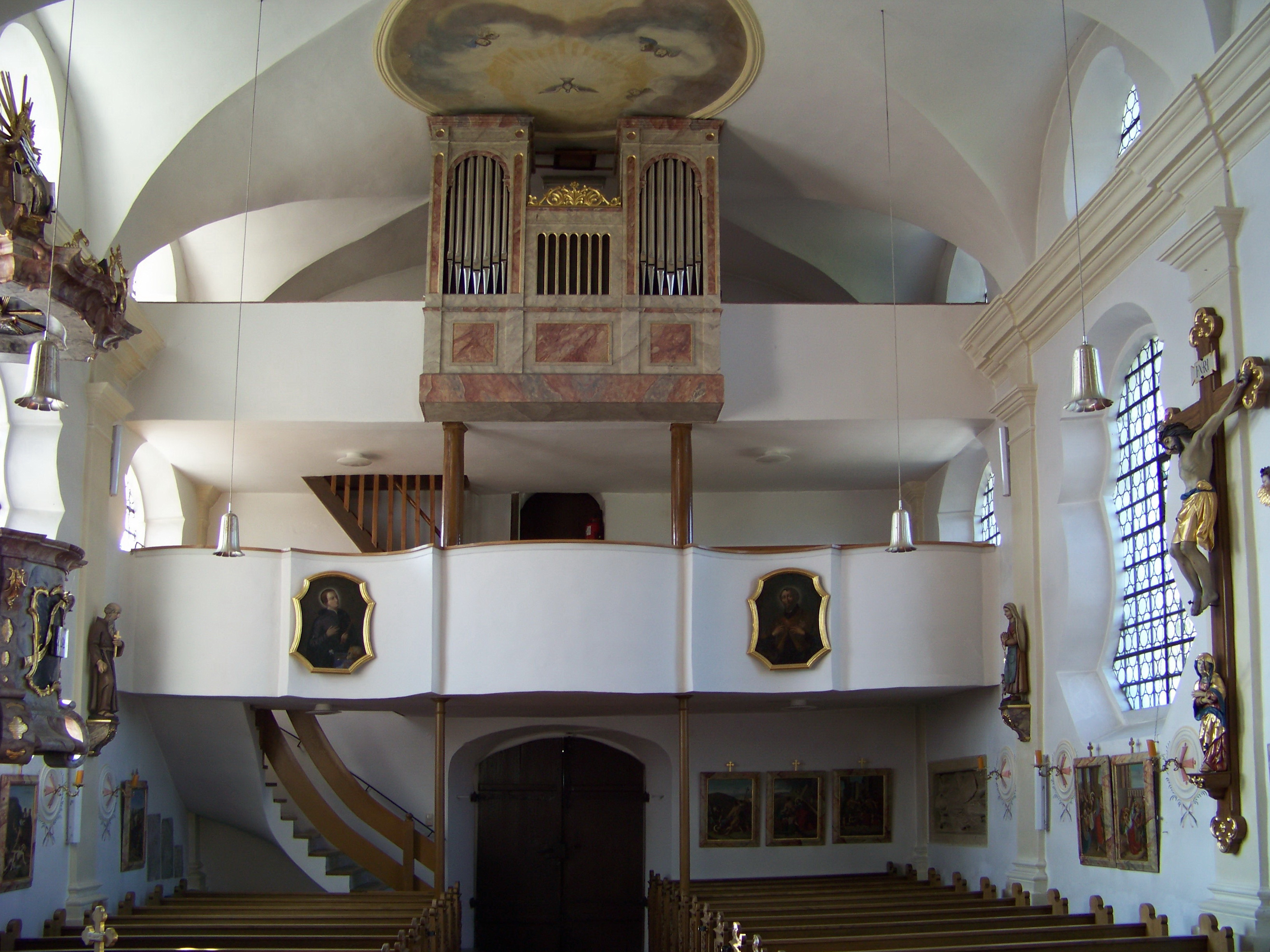 Neufahrn in Niederbayern. Hofendorf 28. Filialkirche St. Andreas. Saalkirche mit eingezogenem Chor und Westturm, Gliederung durch Lisenen und Putzbänder, Westturm mit Geschossgliederung, Achteckaufsatz und Zwiebelkuppel, 1747 von Johann Georg Hirschstötter; mit Ausstattung. Doppelgeschossige Westempore mit Orgel.